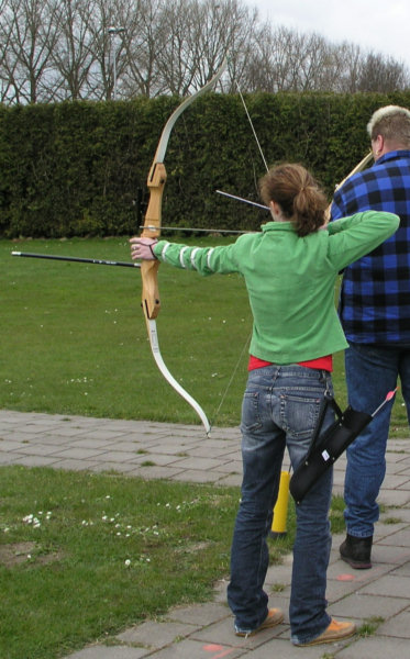 Schieten met de recurveboog. Eigen foto E van Herk 2005 GNU FDL